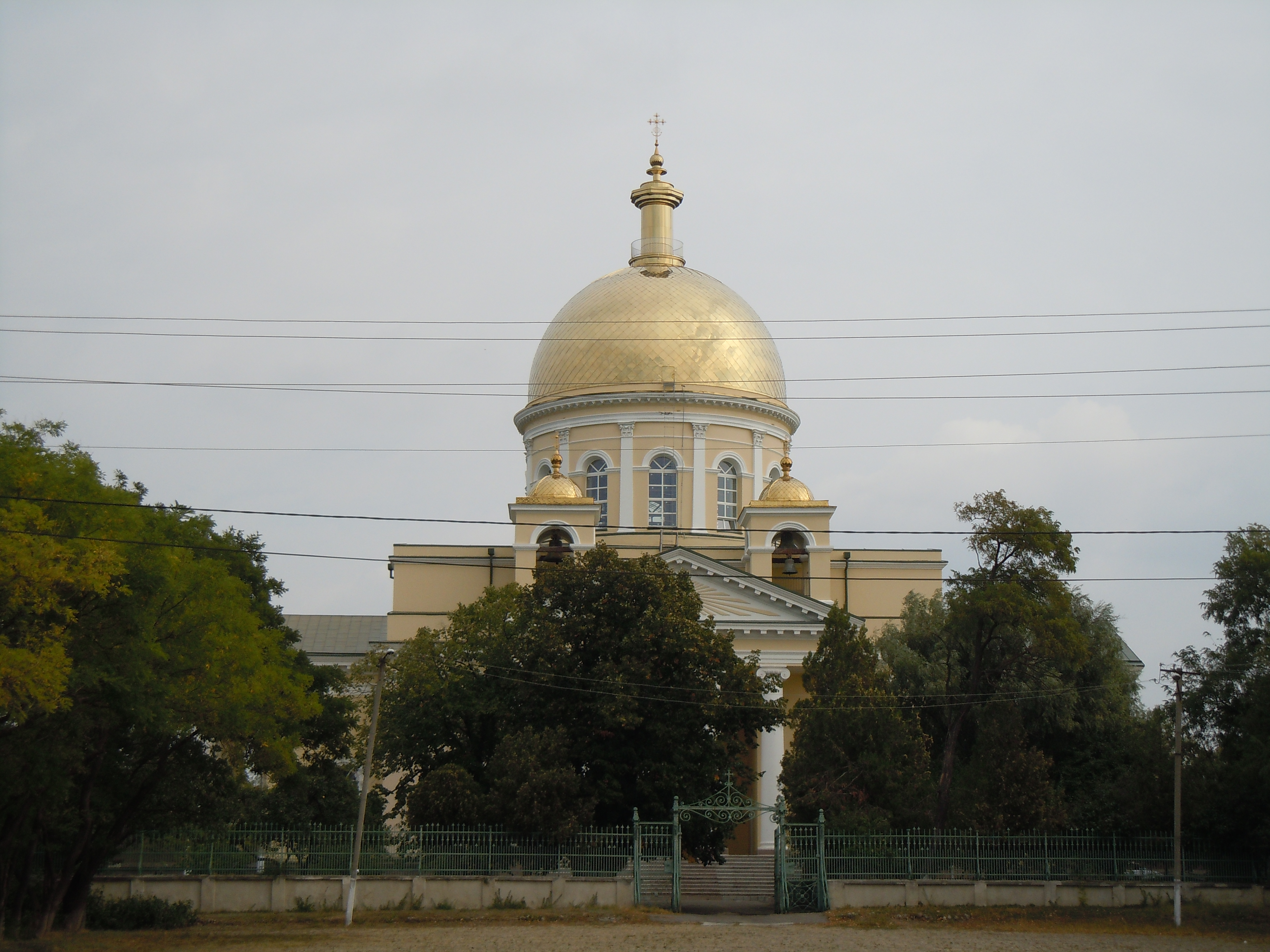 Преображенський собор, Болград, пр-т Леніна, ріг вул. Поштової і Училищної